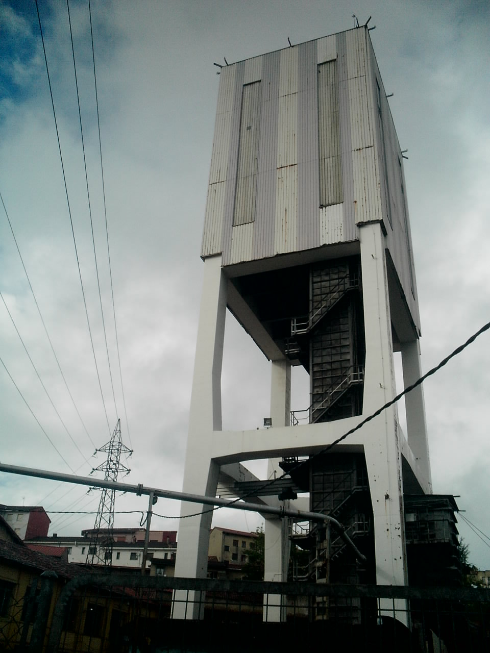 Torre de extracción del Pozo Santa Eulalia (Candín 1) de La Felguera (Asturias, España)